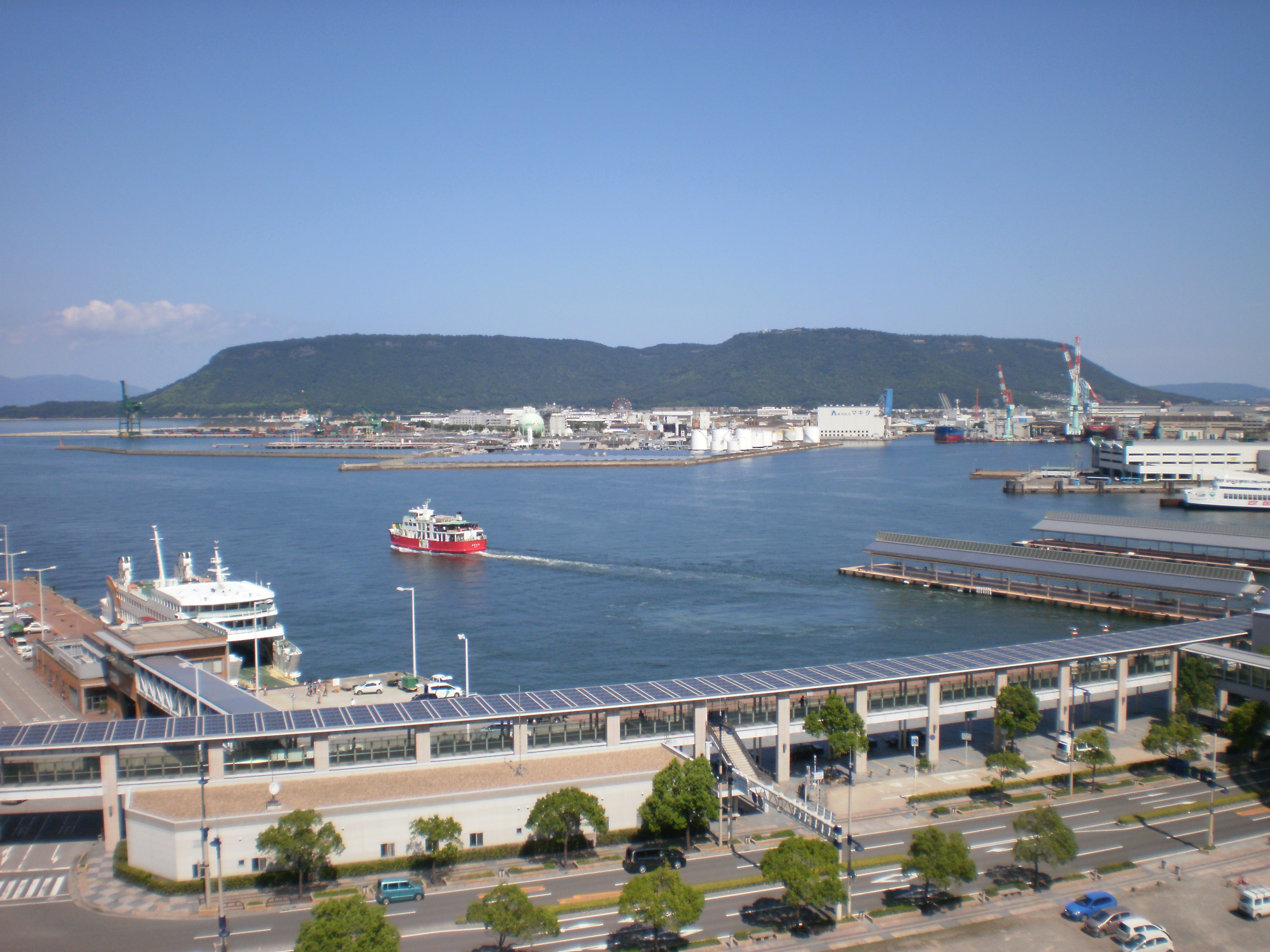 サンポート高松からの屋島